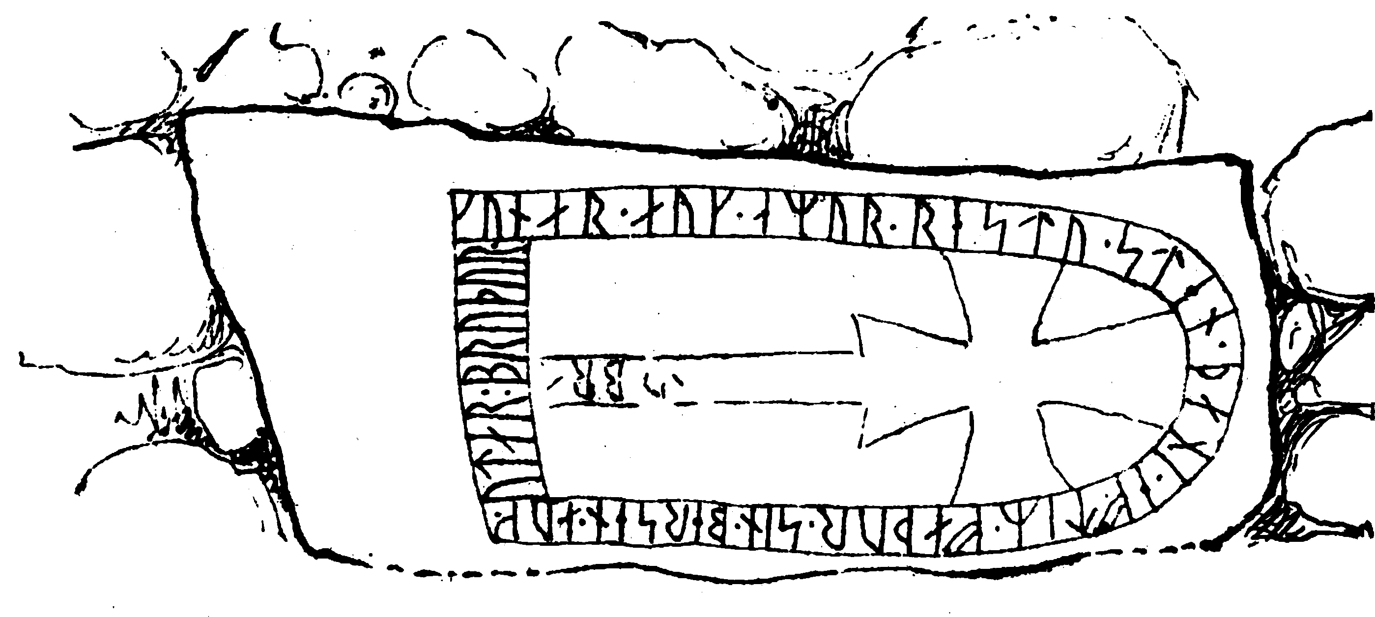 Östergötlands runinskrifter 118 inmurad i Slaka kyrkogårdsmur. Teckning i "Utdrag af Antiqvitets-Intendenten P. A. Säves afgifna berättelse för år 1861", publicerad i Antiqvarisk tidskrift för Sverige band 1, 1864.